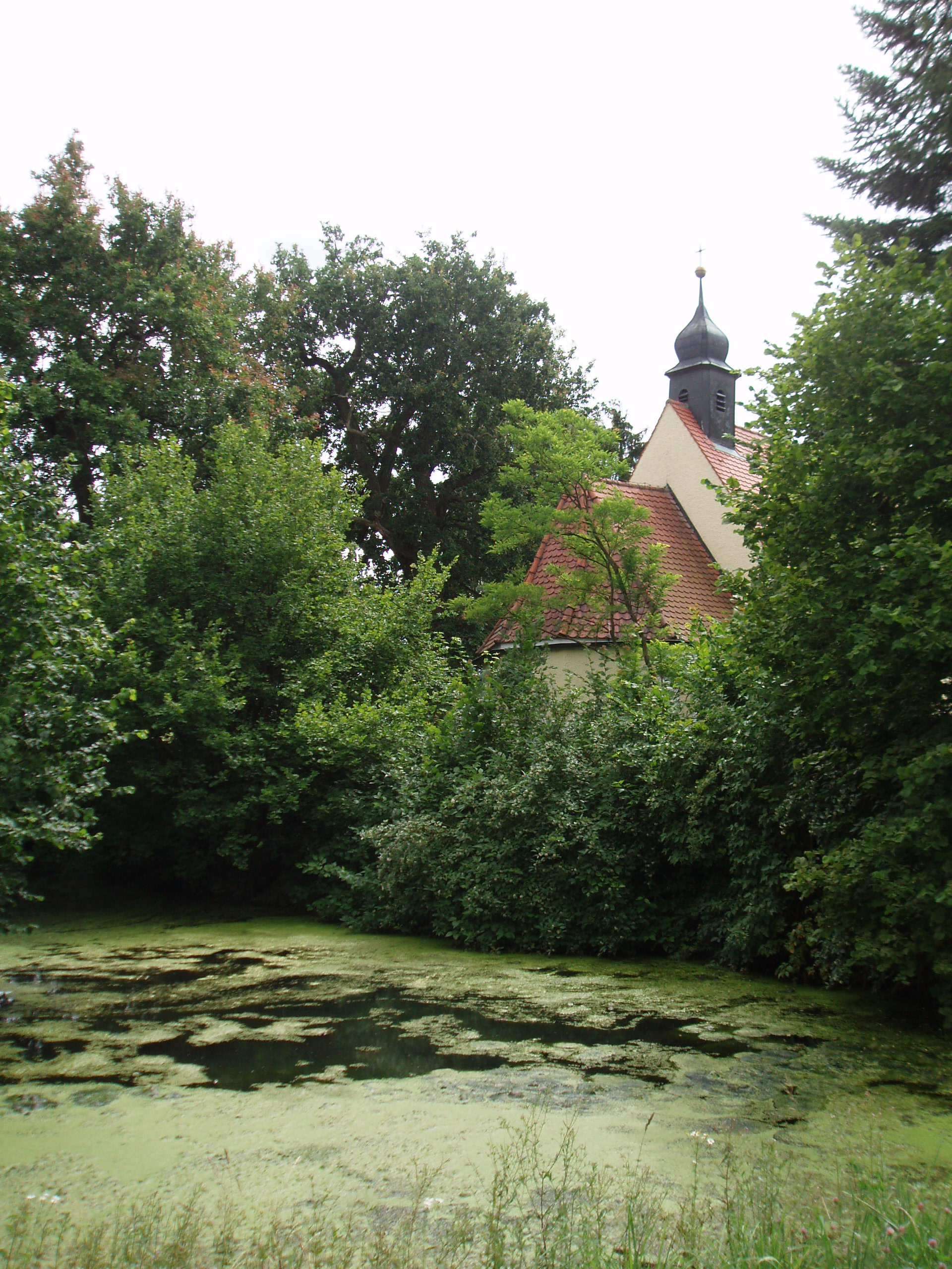 Kapelle St. Michael in Harlanden, Landkreis Eichstätt